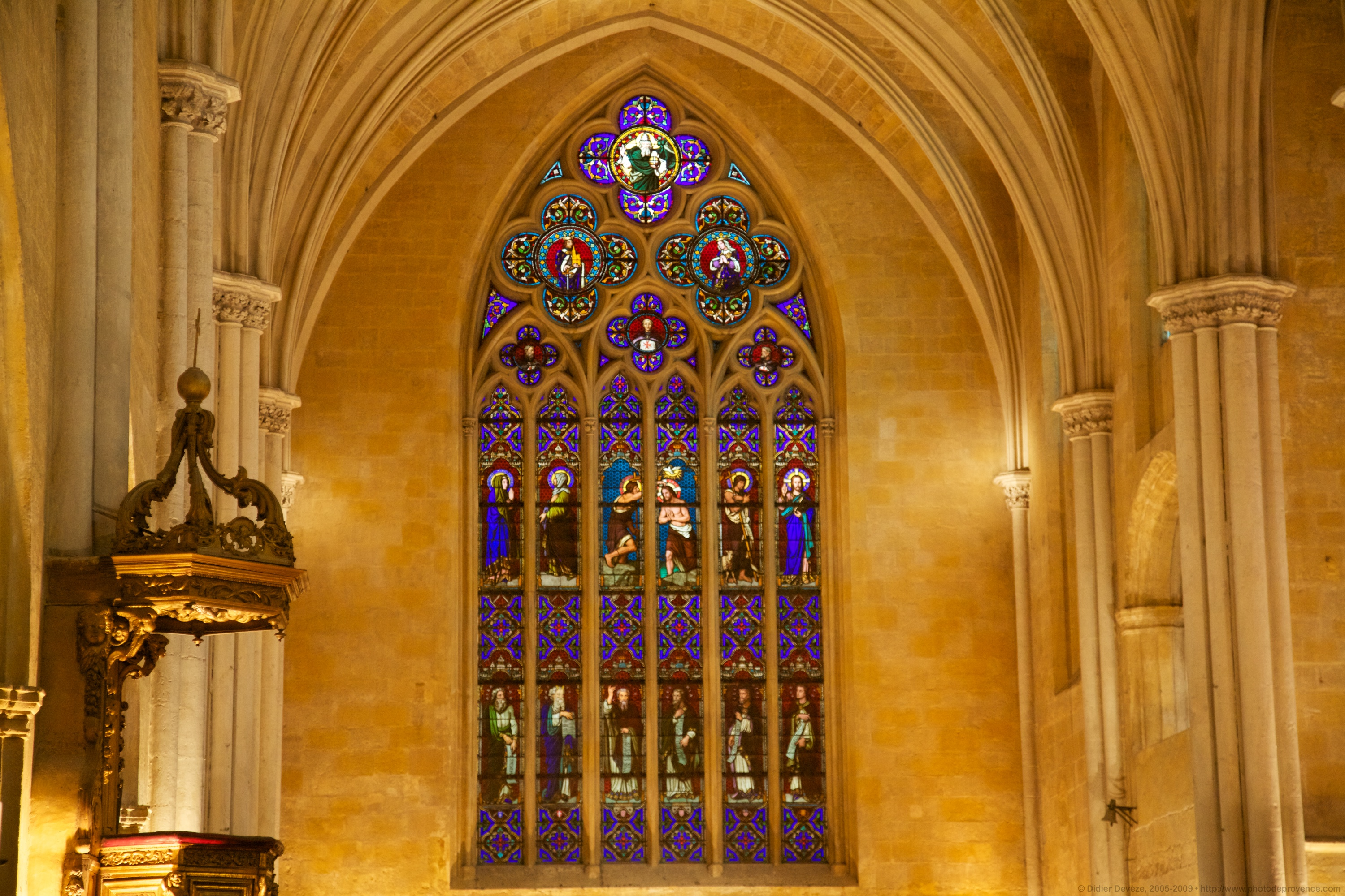 Détail du vitrail église Saint-Jean de Malte - Aix-en-Provence .